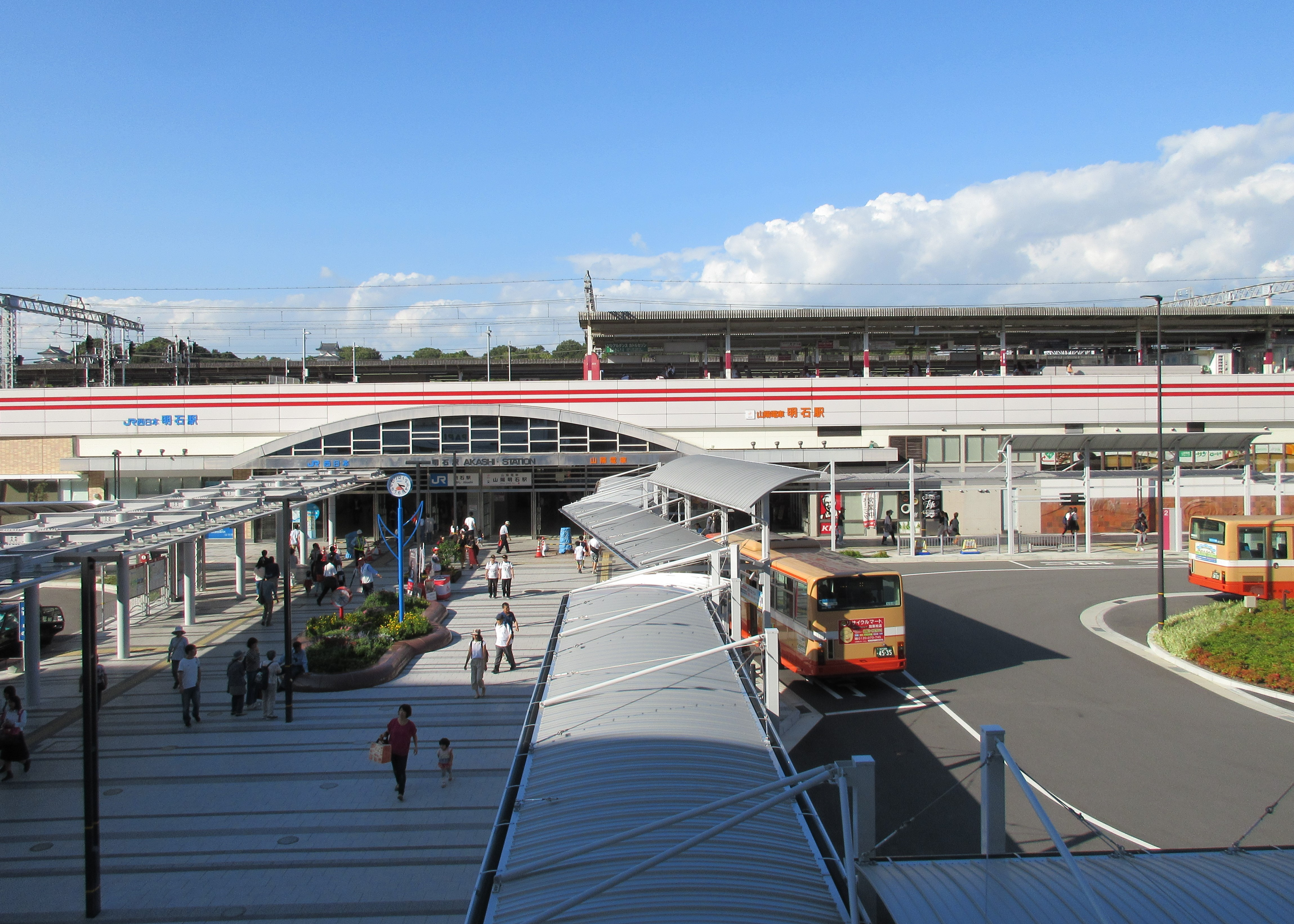 明石駅南口